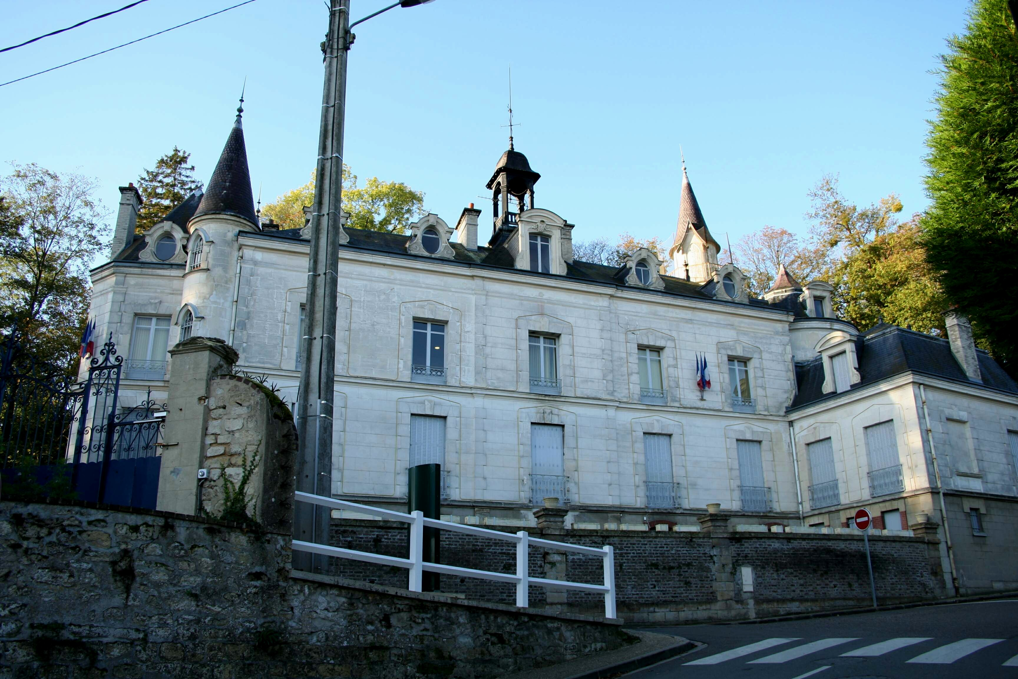 Mairie de Hardricourt - Yvelines (France)